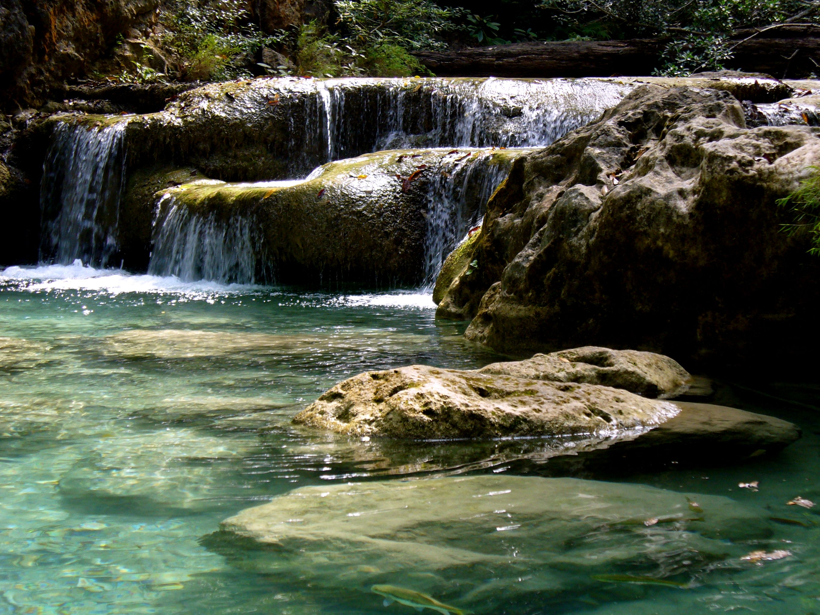 Erawan National Park, Kanchanaburi, Thailand